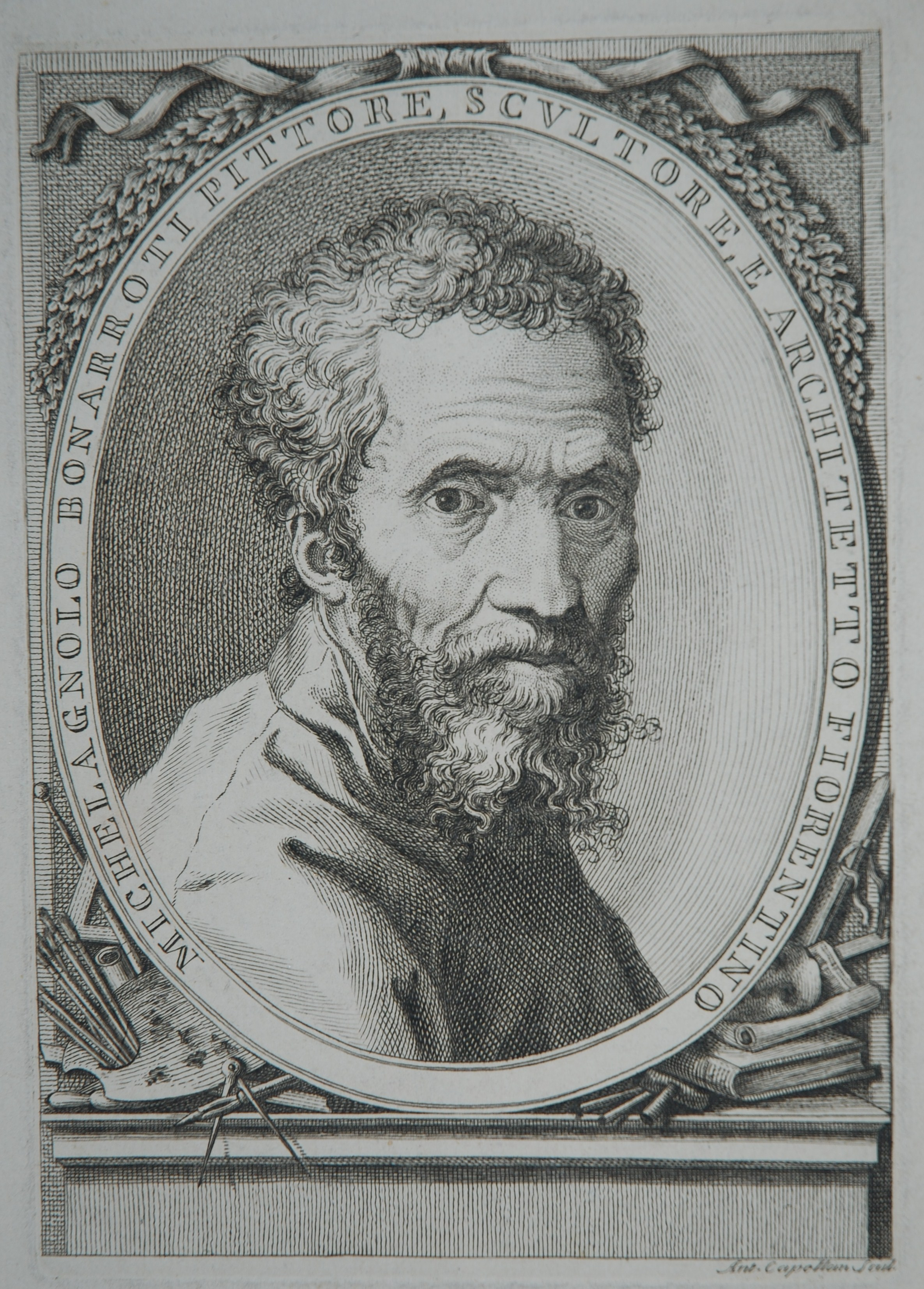 Michelangelo Buonarroti, Kupferstich, Antonio Capellani 1760 nach Giorgio Ghisi 1565